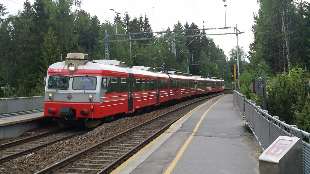 Dobbeltsett av tp. 69A (nærmest) og 69B ved Vevelstad holdeplass. Bemerk at styrevogna i B-settet bare har en inngangsdør på hver side.